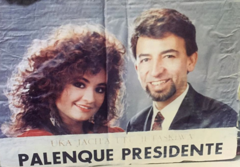 Conciencia de Patria puso a una pareja como símbolo del partido